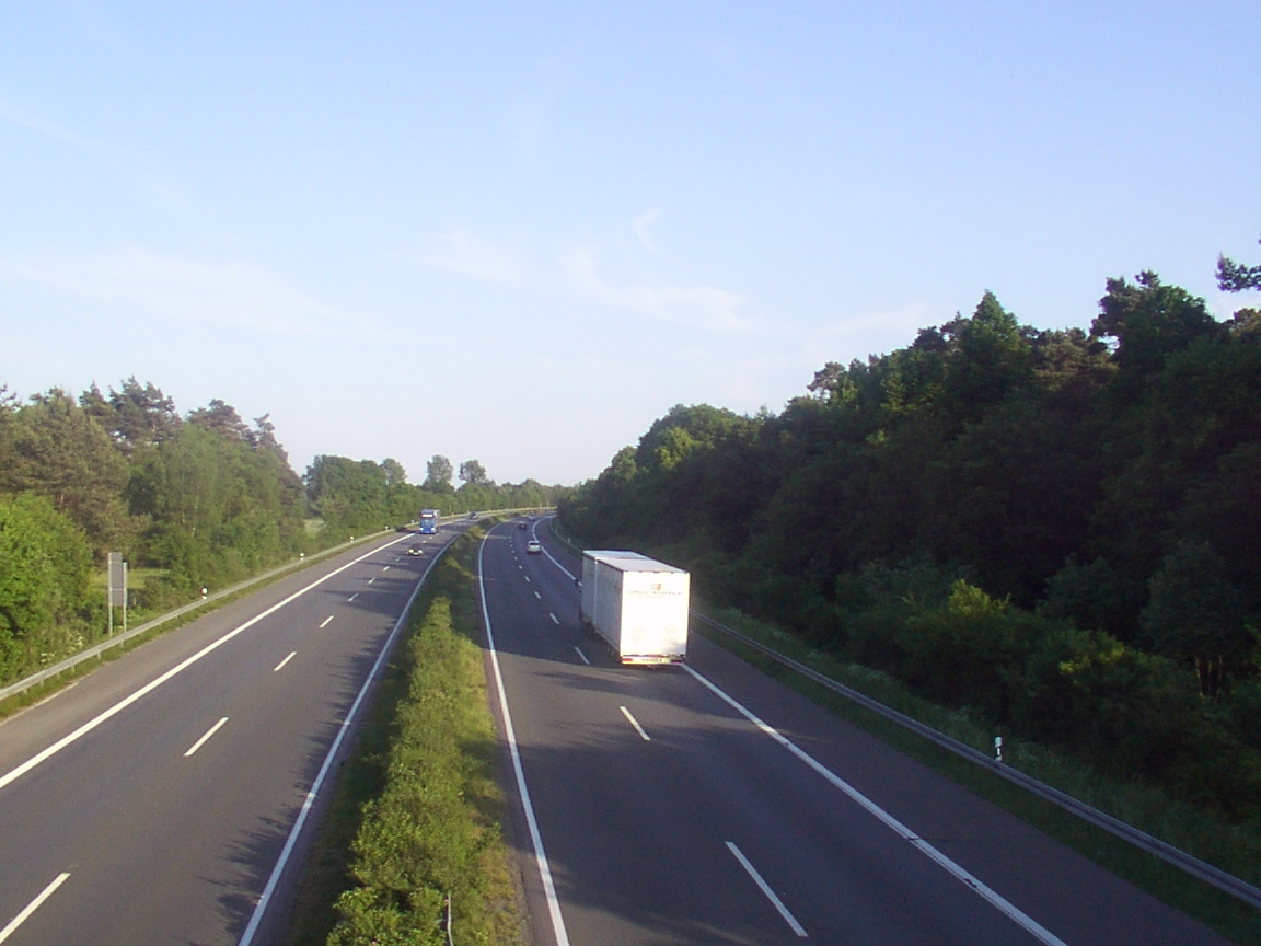 Bundesautobahn 33 bei Hövelhof, von der Brücke der Sennestraße über die Autobahn aus fotografiert